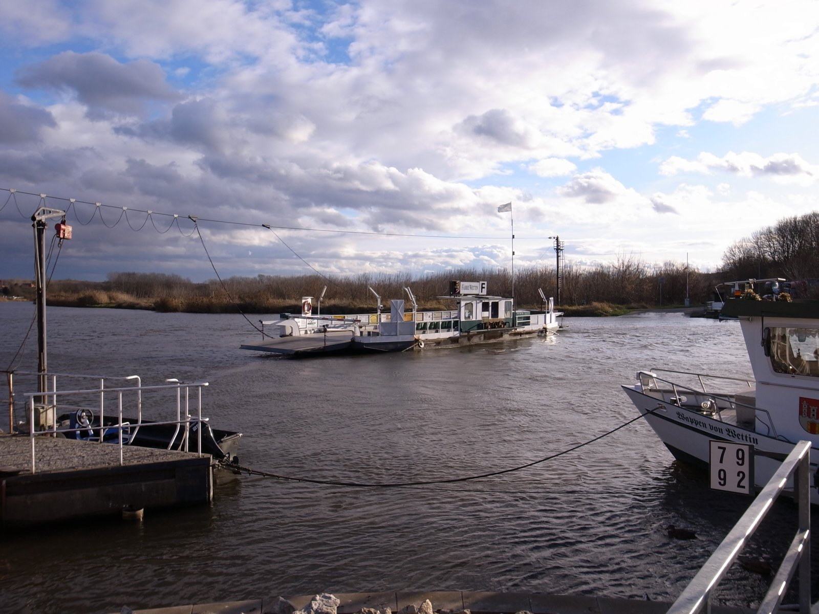 Wettin, Hochseilfähre über die Saale, Straßenverbindung, L 156/ Wettin - Könnern